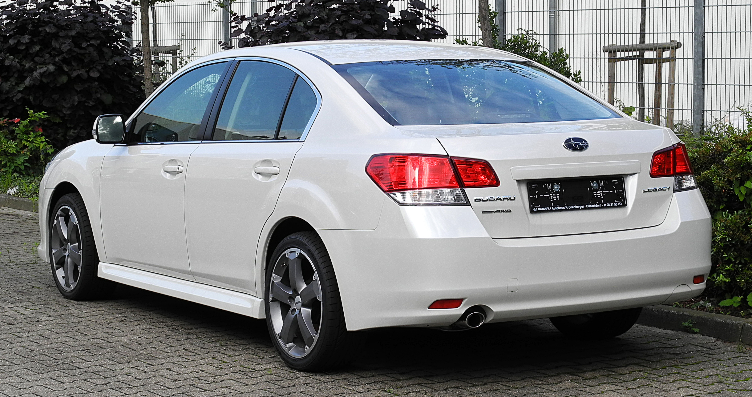 Subaru Legacy 2.0i Comfort (V)